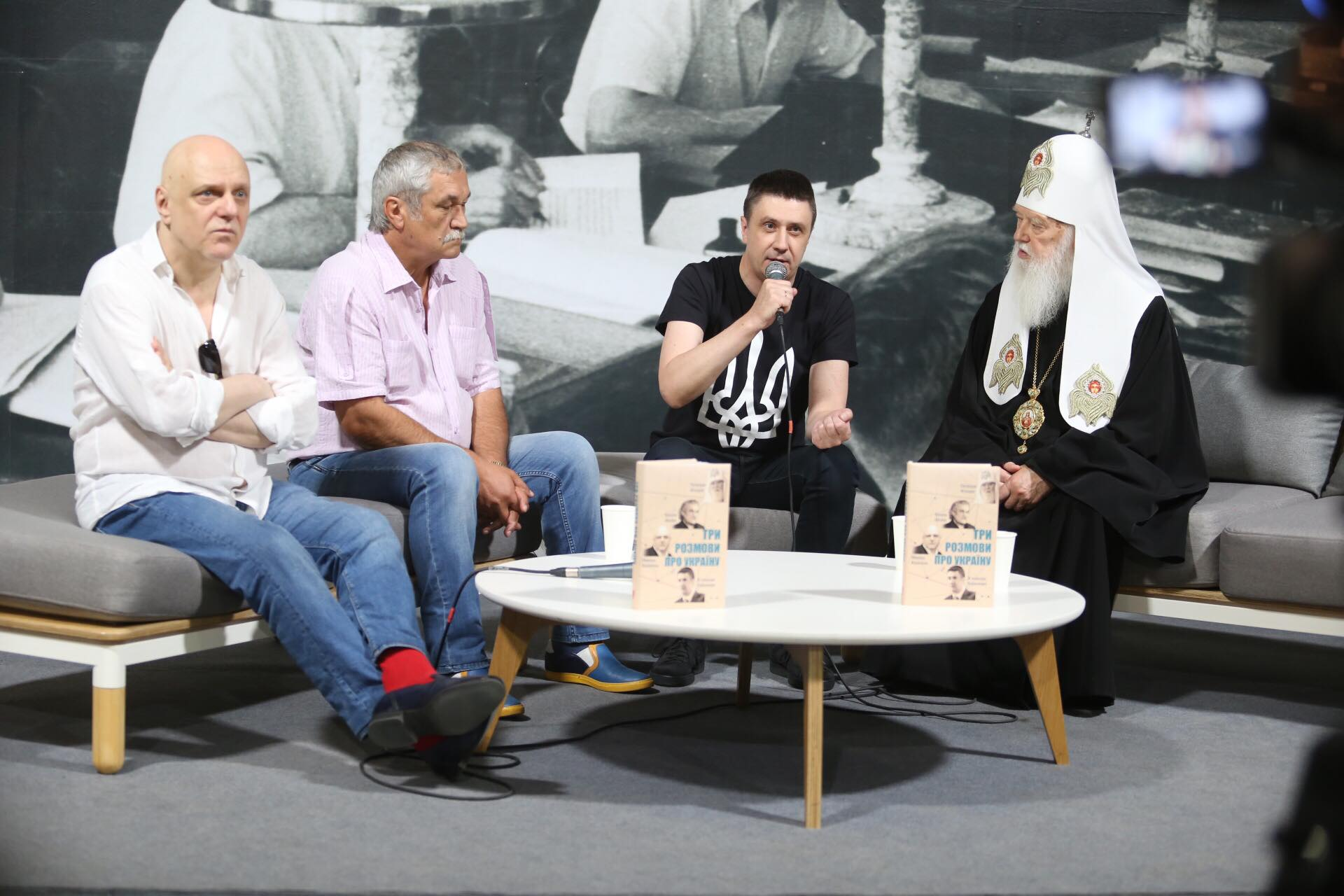 Передпрезентація на Книжковому арсеналі-2018